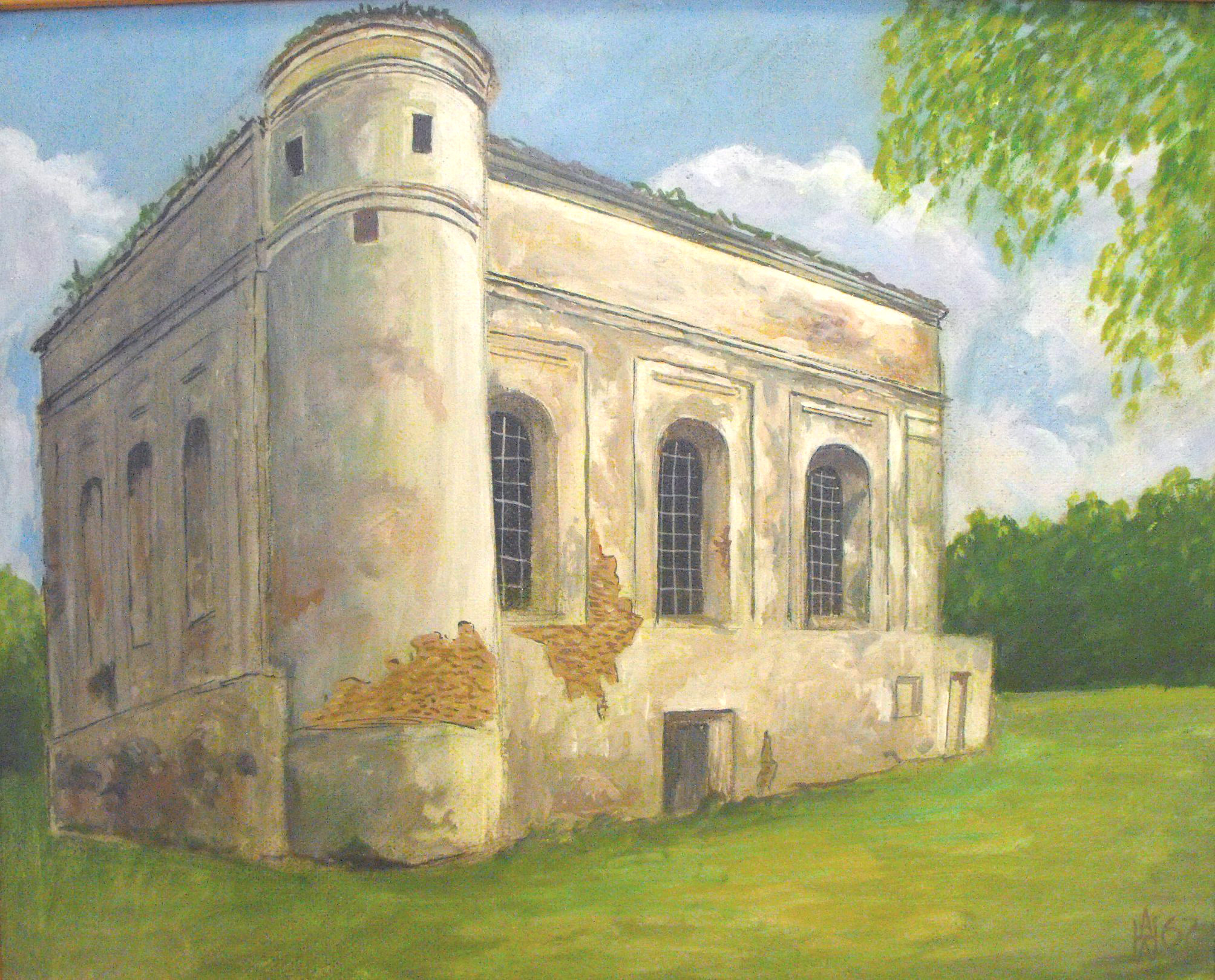 Синагога в Быхове. 1967 год. Яичная темпера. ДВП. Художник Анатолий Александрович Наливаев.